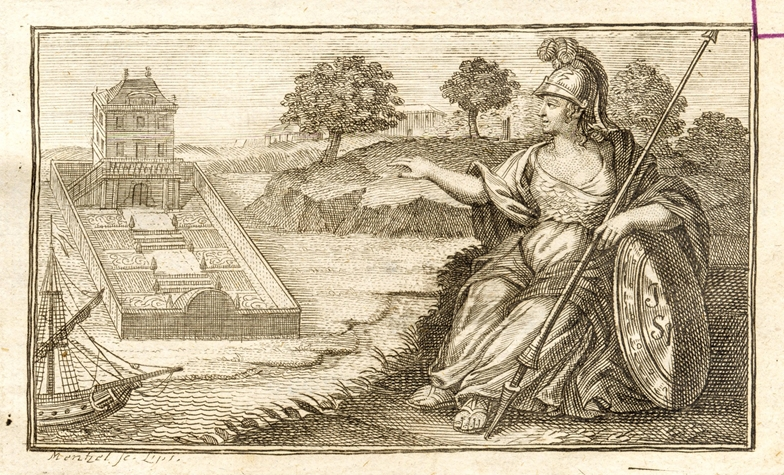 Jakob Theodor Kleins Garten und Museumshaus. Titelvignette des Werkes "Historiae Avium Prodomus" von J. G. Mentzel (1675-1750), Lubecae 1750, nach einer Vorzeichnung von Dorothea Juliana Gralath. geb. Klein.